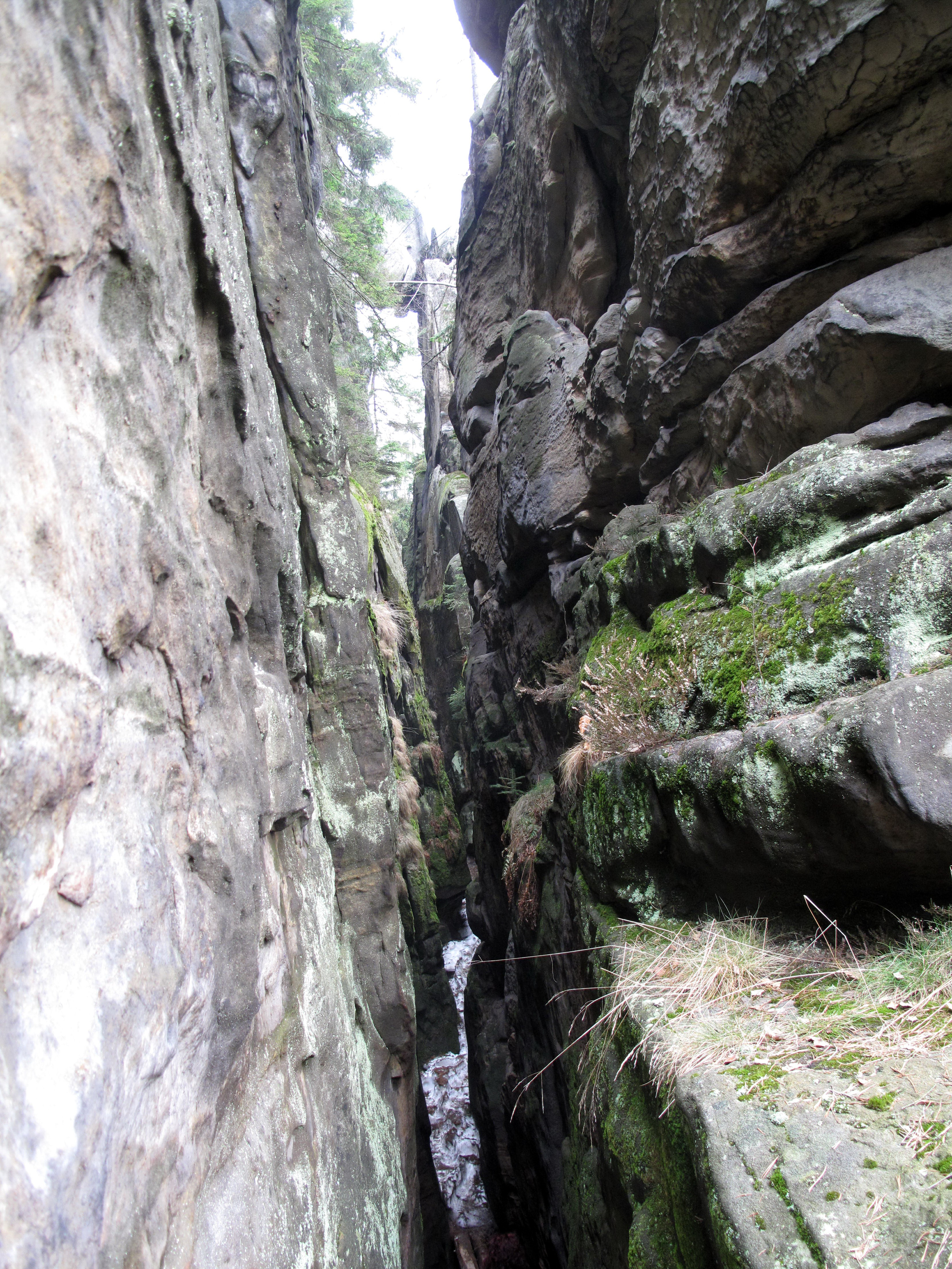 Sluj Českých bratří